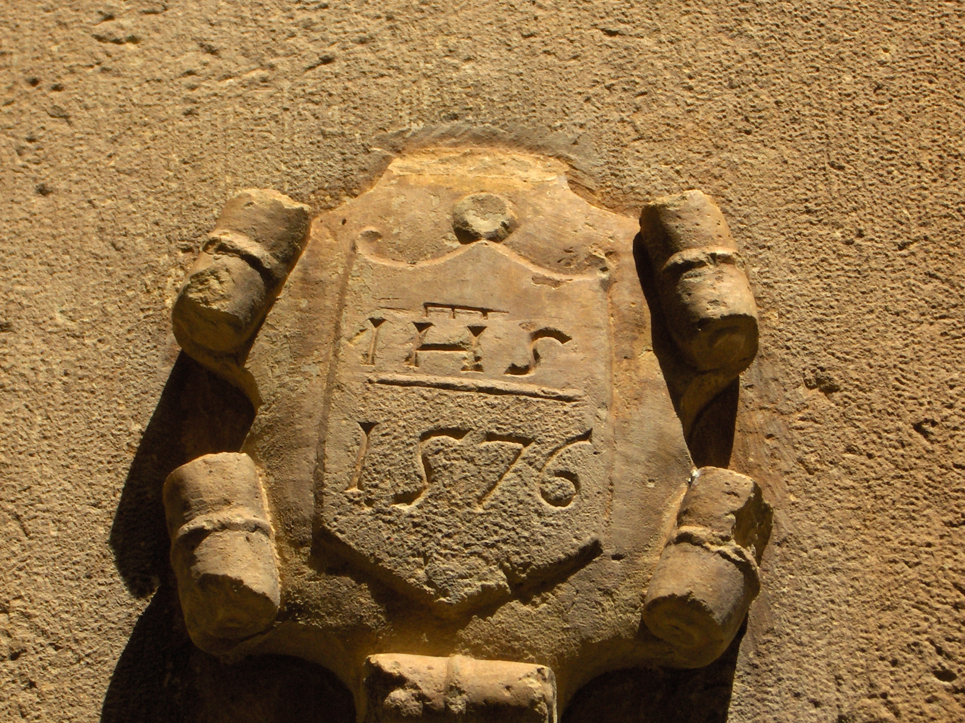 Xifra del segle XVI al Talladell